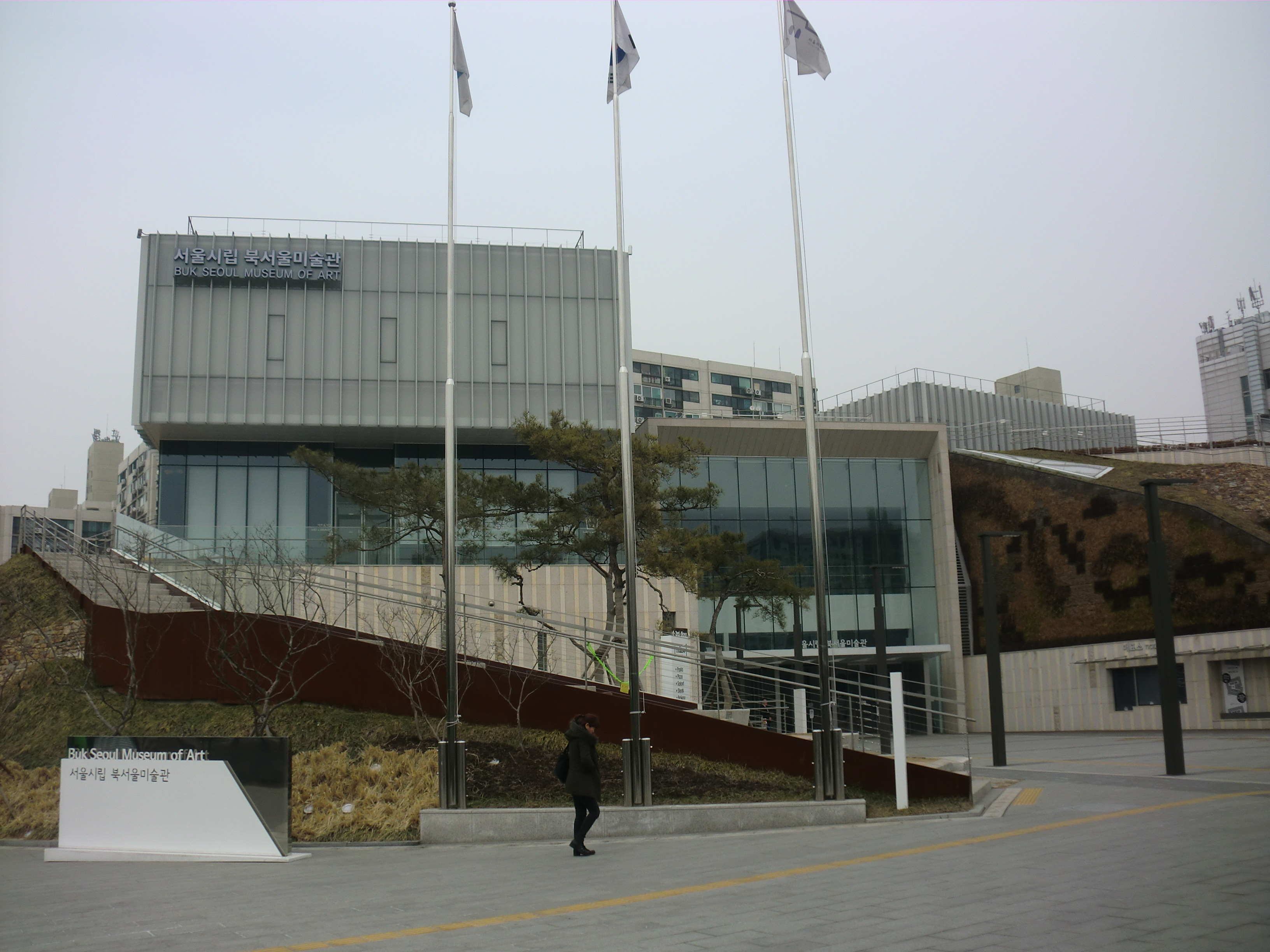 서울특별시 노원구에 있는 서울시립북서울미술관